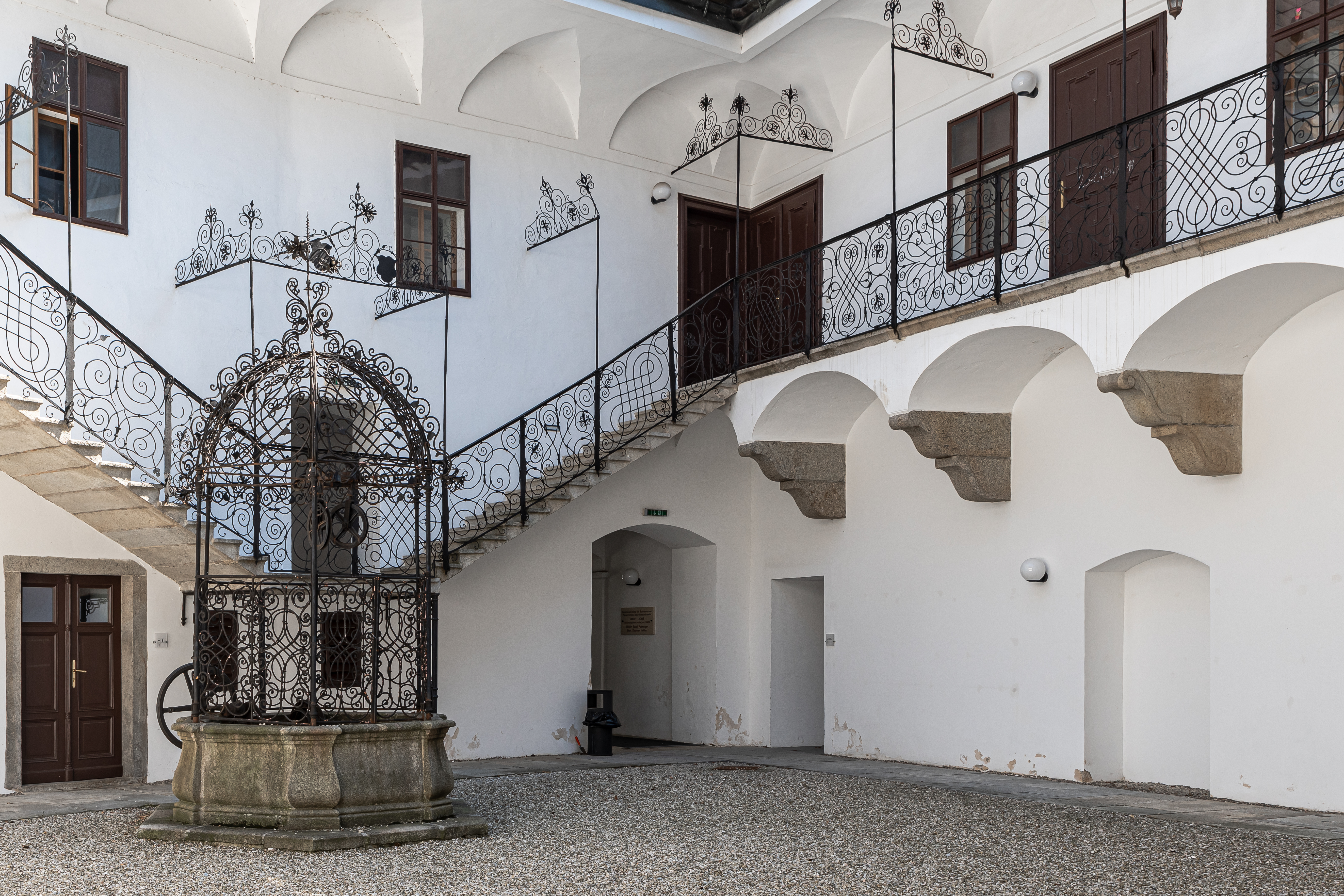 Im Hof des Schlosses Tollet steht ein Ziehbrunnen mit einem Brunnenkorb aus Schmiedeeisen. Die umlaufende Galerie hat ein ein schmiedeeisernes Geländer.